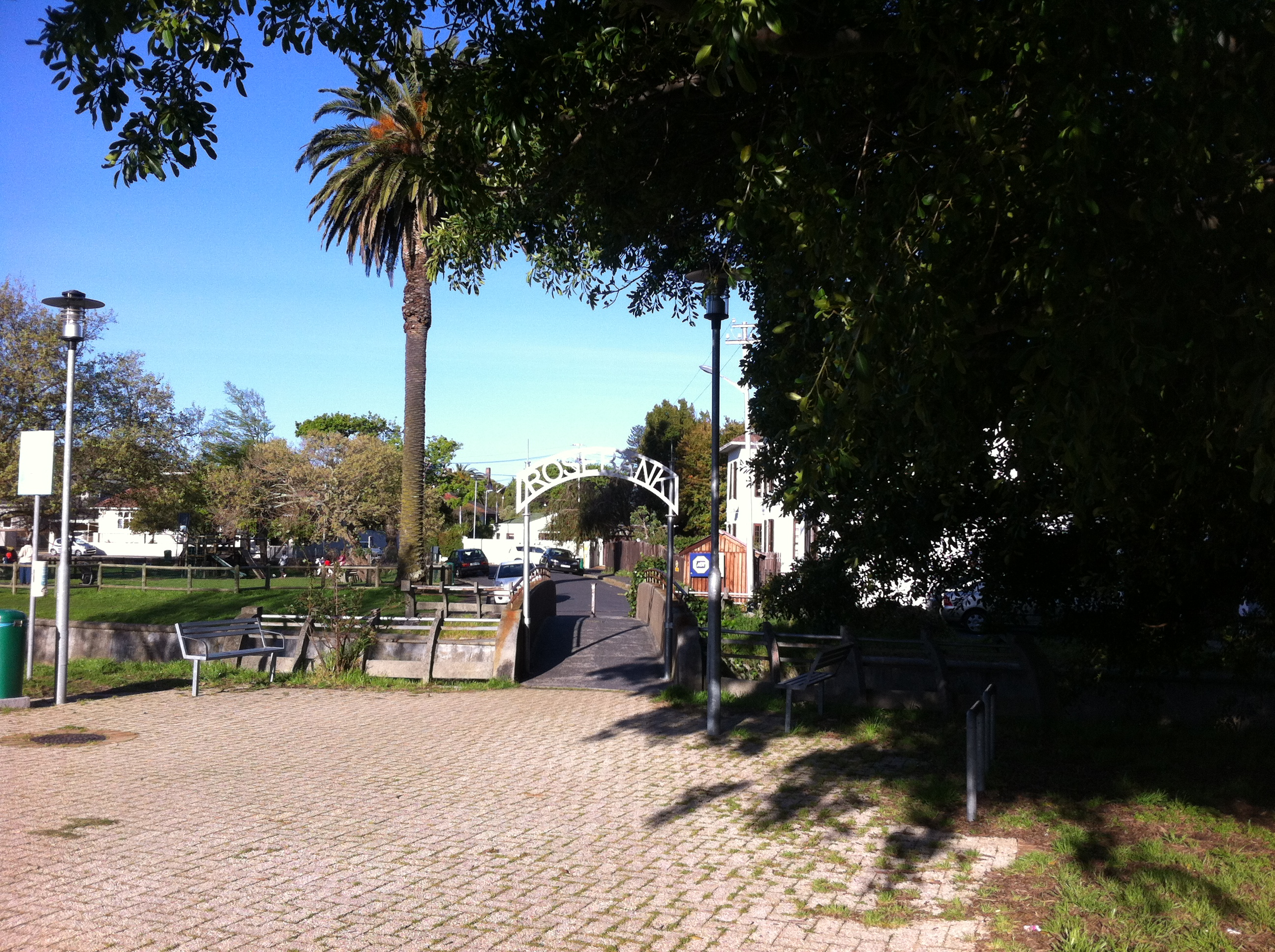 Pedestrian bridge in Rosebank, Cape Town, South Africa